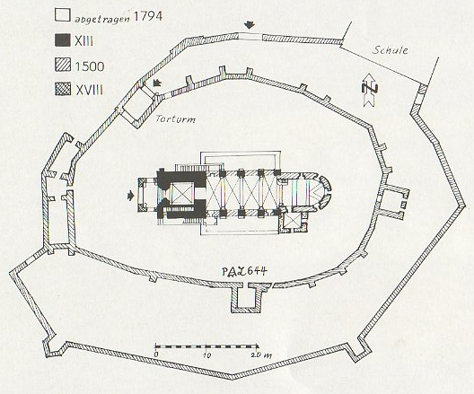 Planul fortificatiei din Hosman.